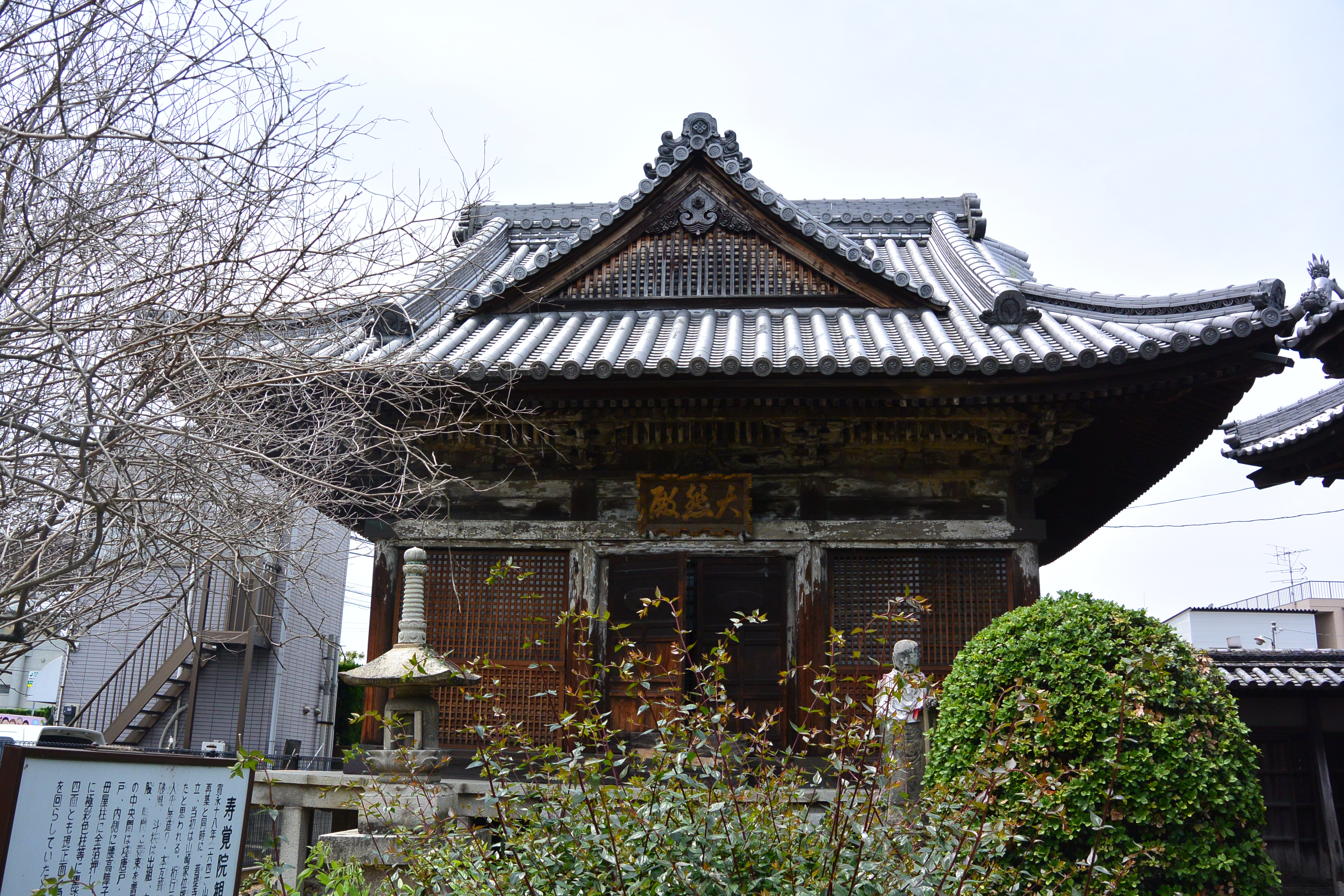 丸亀市の寿覚院観音堂、丸亀市有形文化財